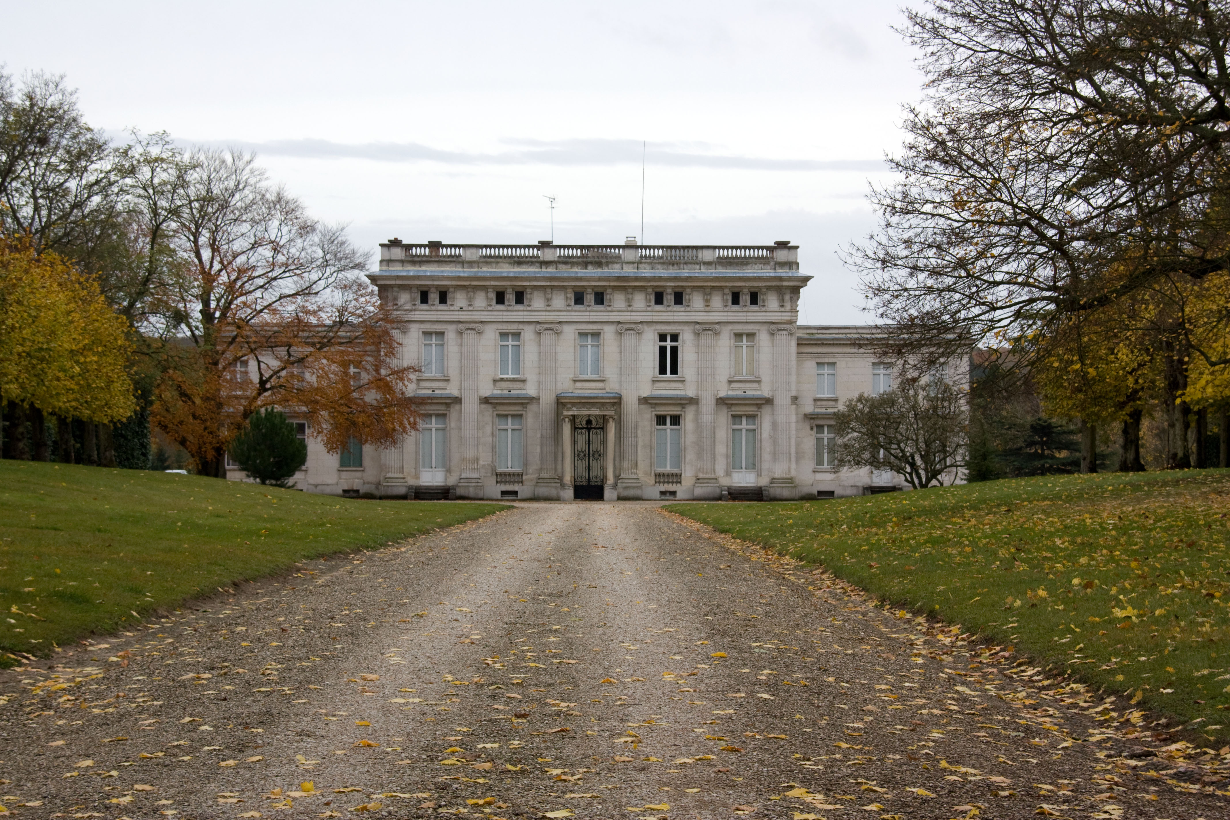 Château d'Écharcon. Écharcon. Essonne. France.